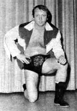 Dory Funk Jr. en une du volume 1 du n.1 du journal de catch Wrestling News du 15 juin 1972. Cowboy Bill Watts, Parente & Hart et Danny Little Bear sont sur l'image mais pas utilisables.